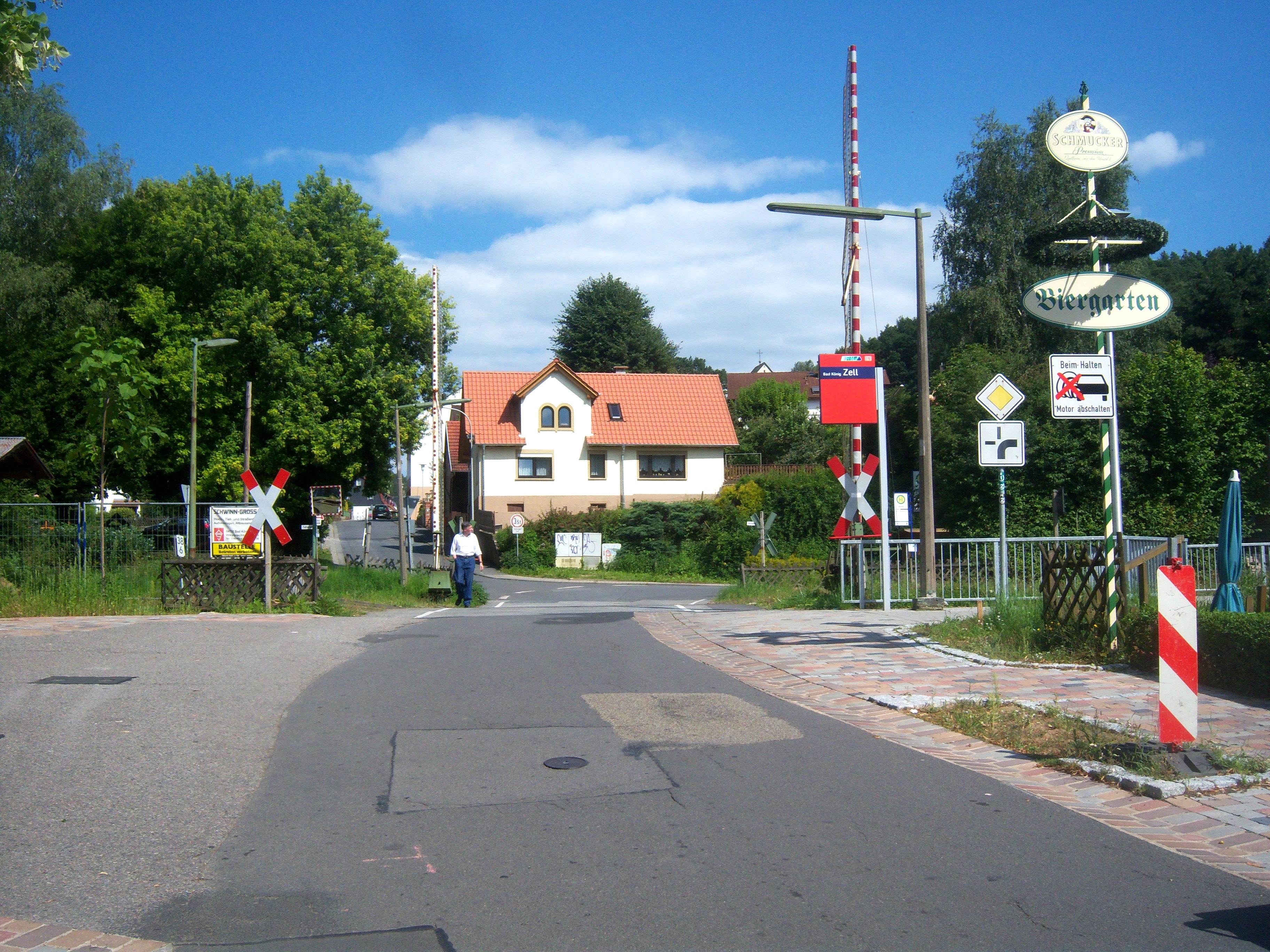 Übergang der Straße An der Alten Schule über die Odenwaldbahn in Zell im Odenwald, Blickrichtung Ost (Weiten-Gesäß) in Hessen (Deutschland)